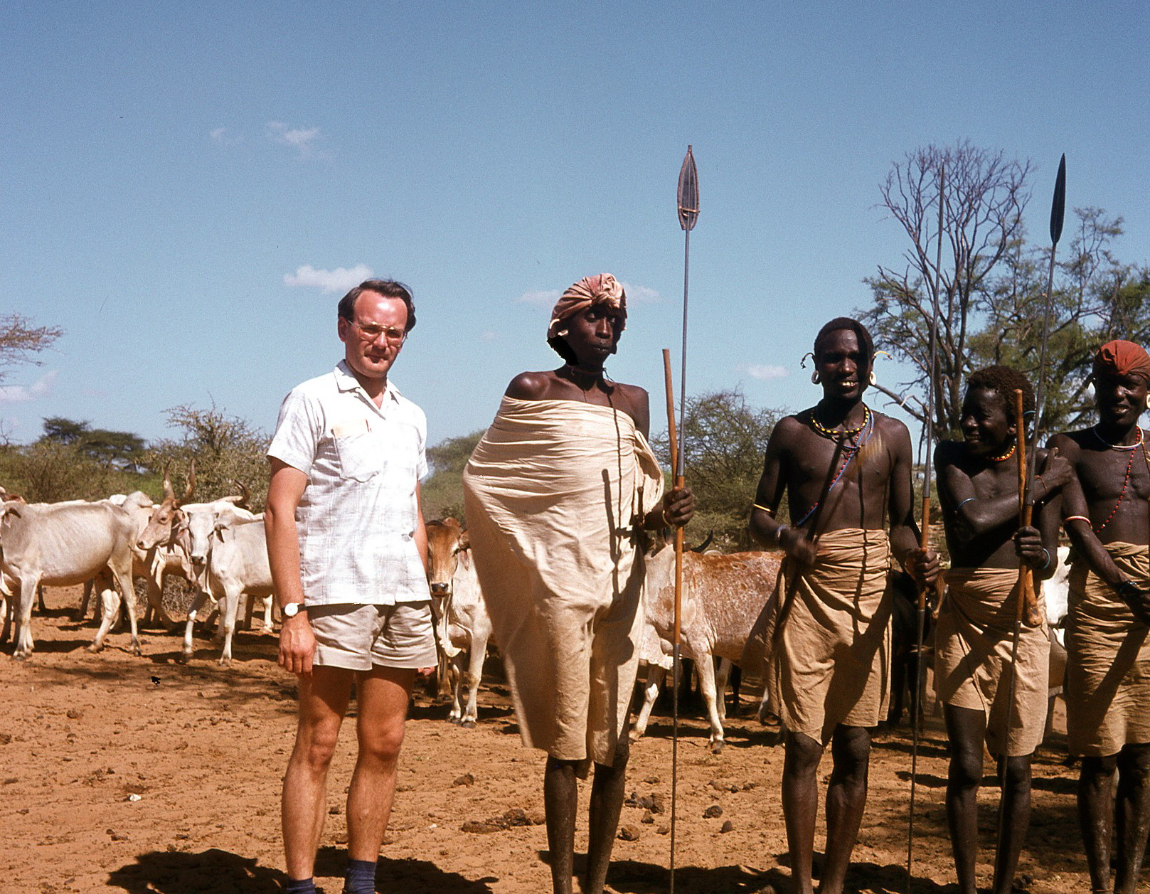 КЕНИЯ. Побережье озера Туркана. В мирное время мужчины туркана проводят много времени за игрой, правила которой так и остались для меня загадкой.